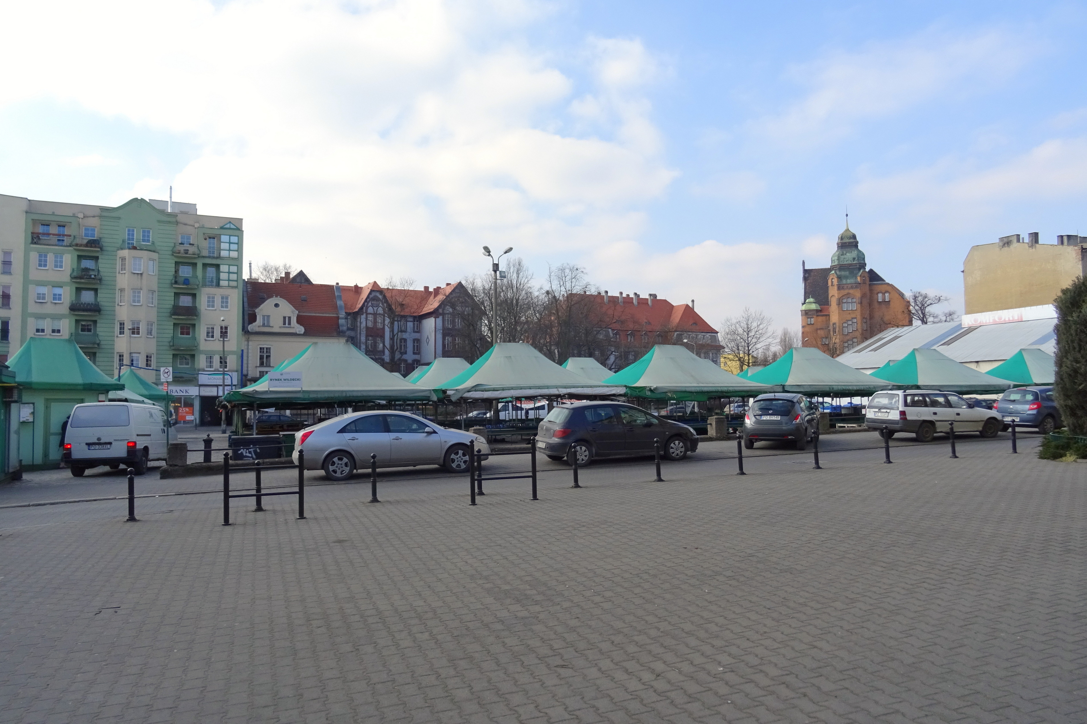 Poznań. Rynek Wildecki - zabudowa wzdłuż ulicy Przemysłowej